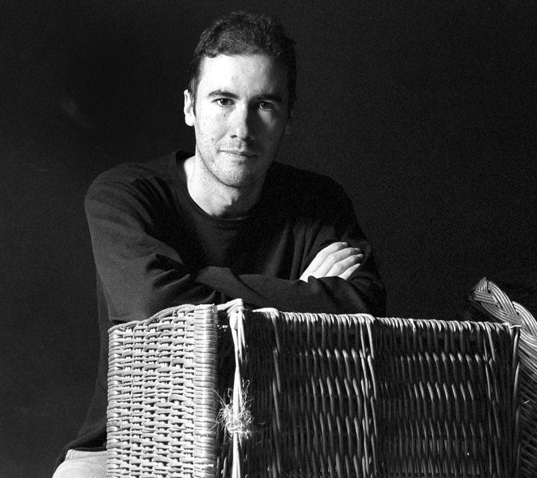 Tomás Afán.